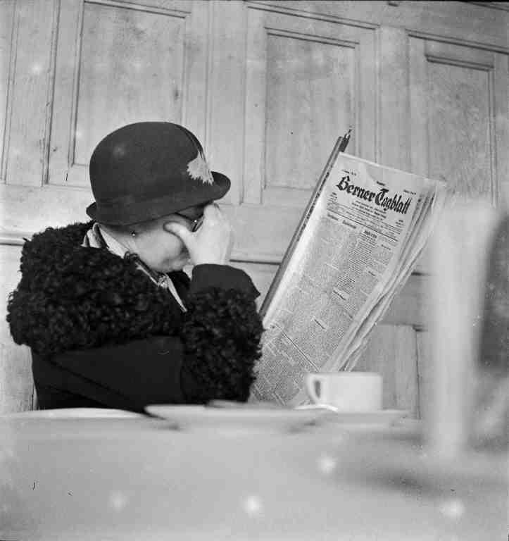 Innenaufnahme mit Berner Tagblatt lesender Frau, Tea-Room Gfeller, Bärenplatz 21, Bern, Schweiz